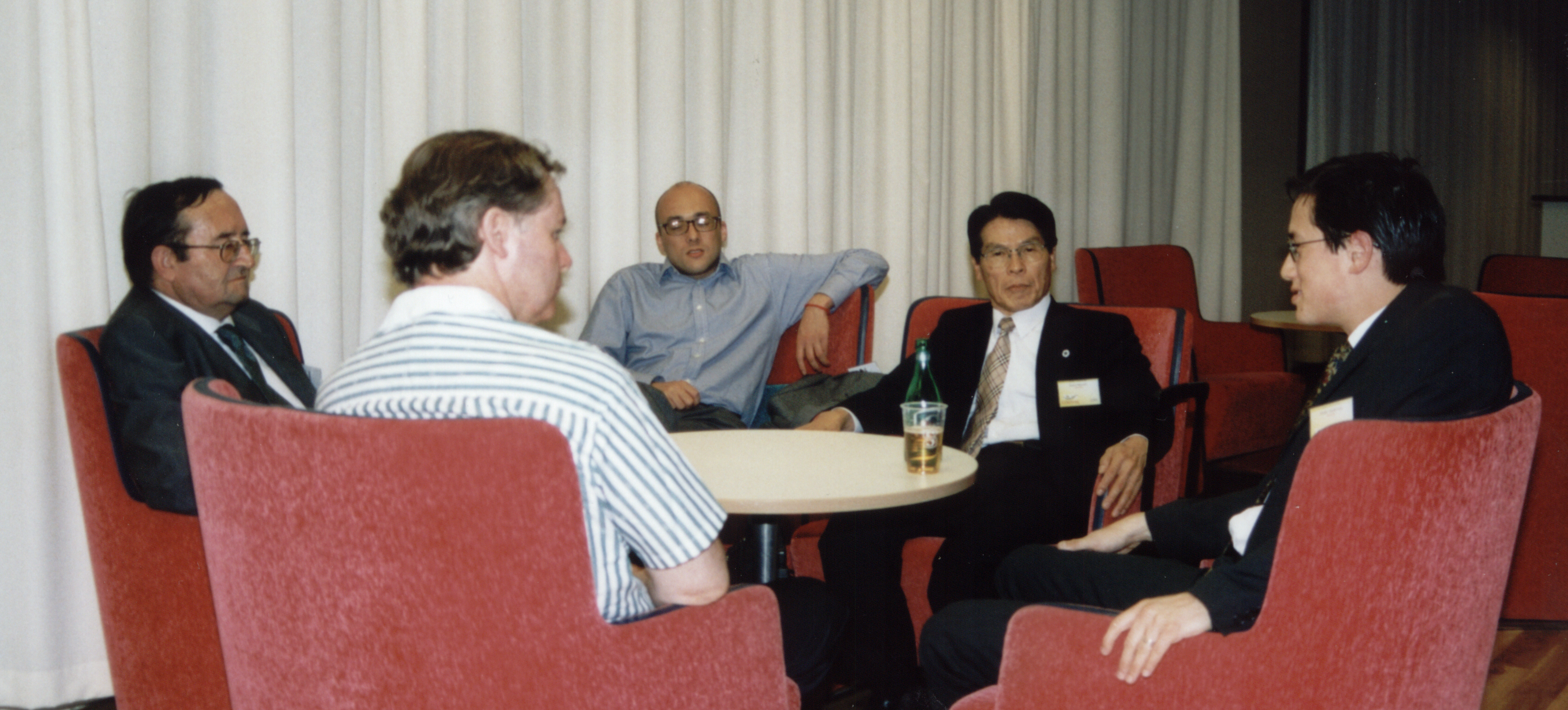 La Universala Kongreso de Esperanto, Gotenburgo 2003. Kunsido de la Eŭropa Esperanto-Unio. De maldekstre: Renato Corsetti, Sean O'Rian, David Ferguson (nun Daffyd ap Iago), Etsuo Miyoshi kaj Marko Lins.